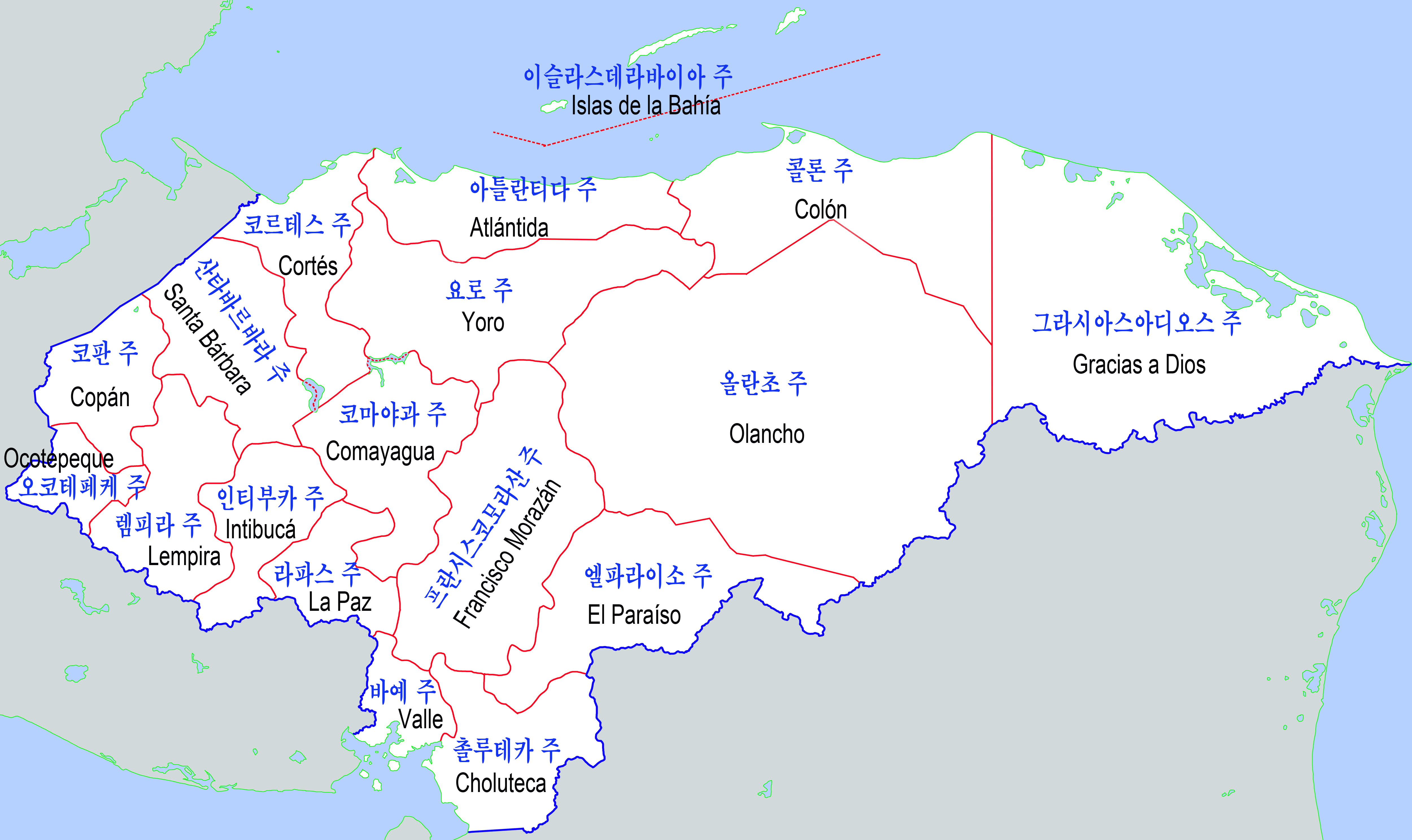 온두라스 행정구역